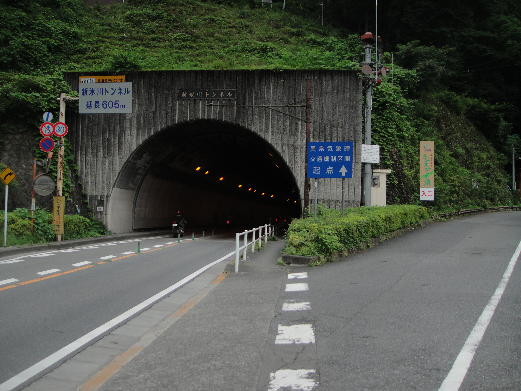 新氷川トンネル